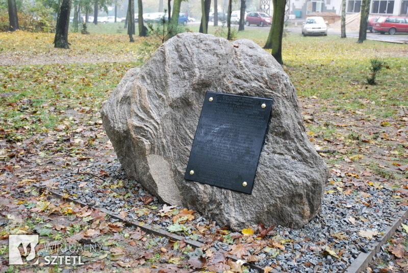 סלע באמצע העיירה סוקולוב פודלסקי כיום המנציח את מקומו של בית הקברות היהודי הישן שהיה קיים במקום בעבר